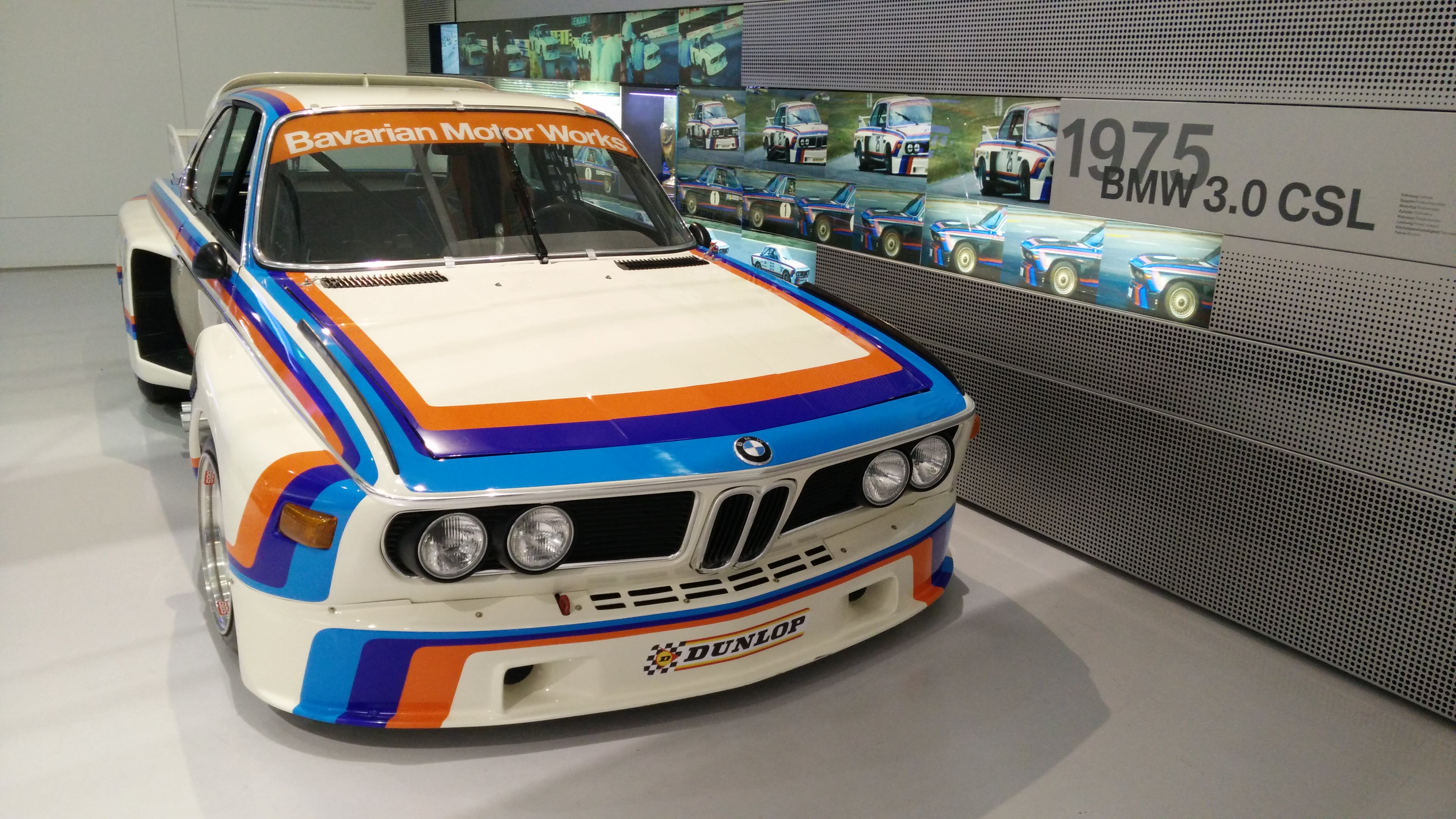 IMG_20141113_120109